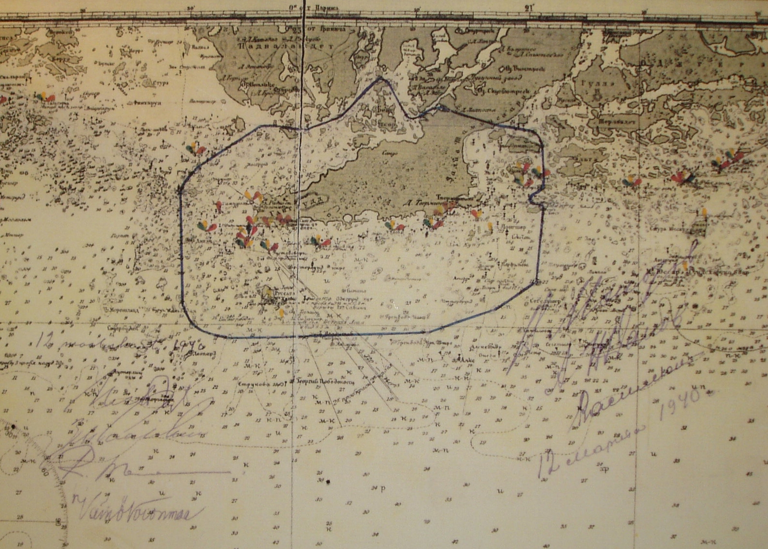 12. maaliskuuta 1940 solmitun Moskovan rauhansopimuksen liitteenä ollut kartta Hangon vuokra-alueen rajoista. Photo by Ohto Kokko